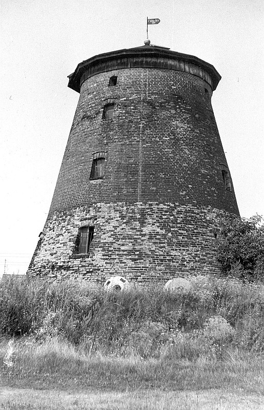 Original image description from the Deutsche Fotothek Straupitz. Wallholländer